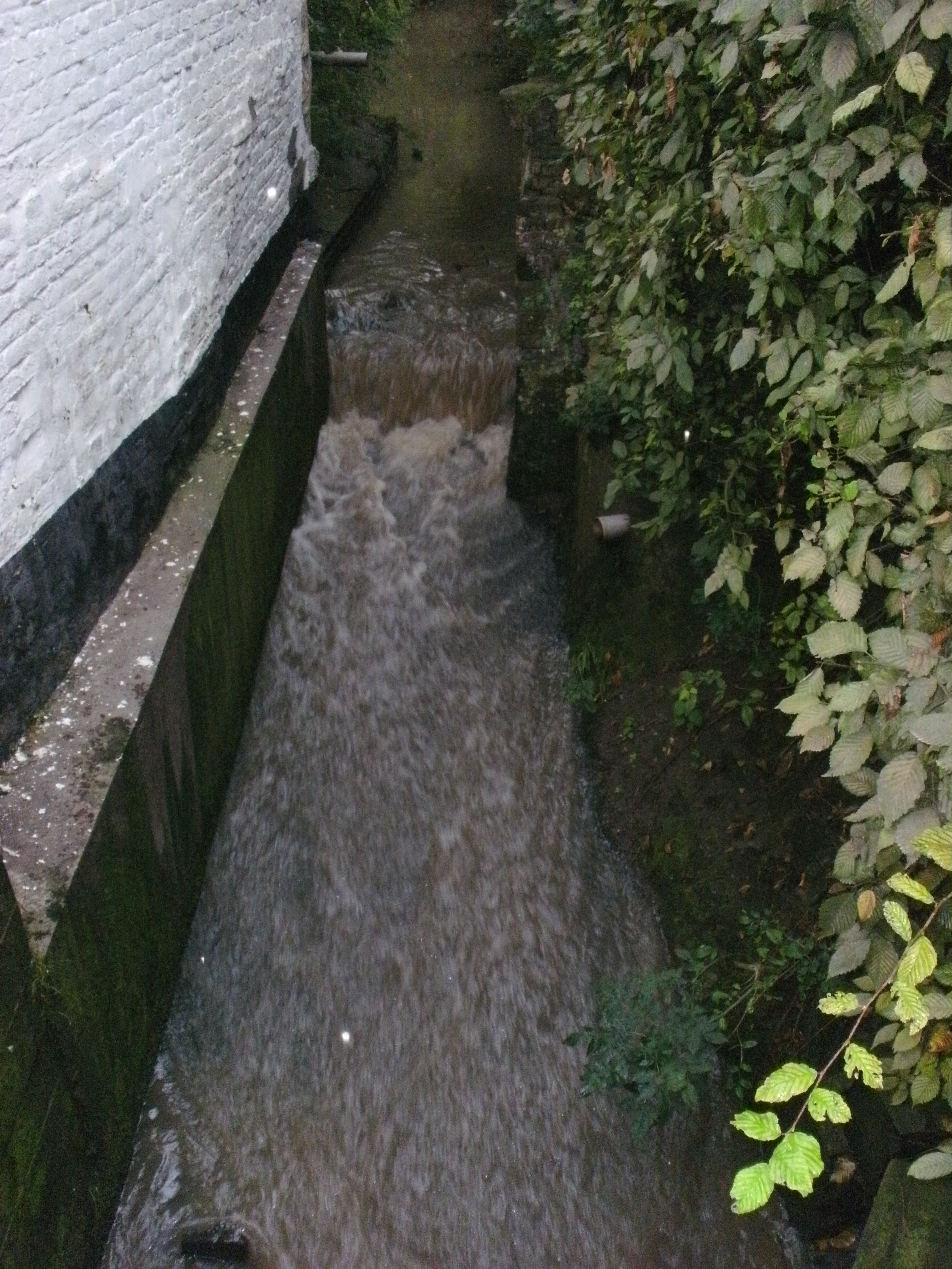 Zwingelmolen te Aaigem, zicht op de beek waar vroeger het rad van de molen stond